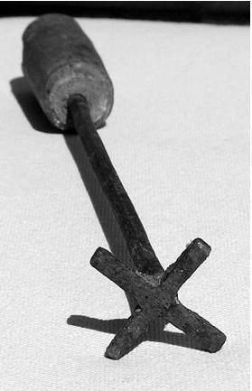 Hierro de San Anton de Valdepolo